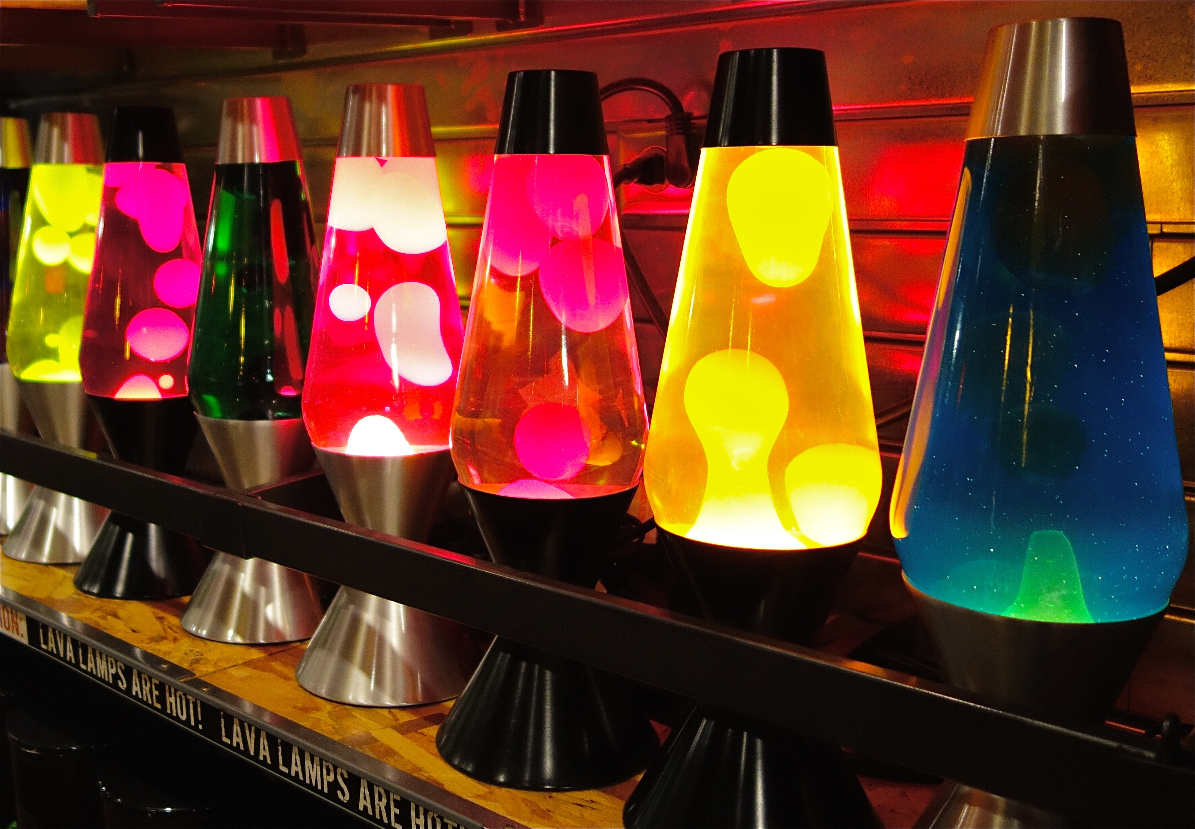 lava lamps